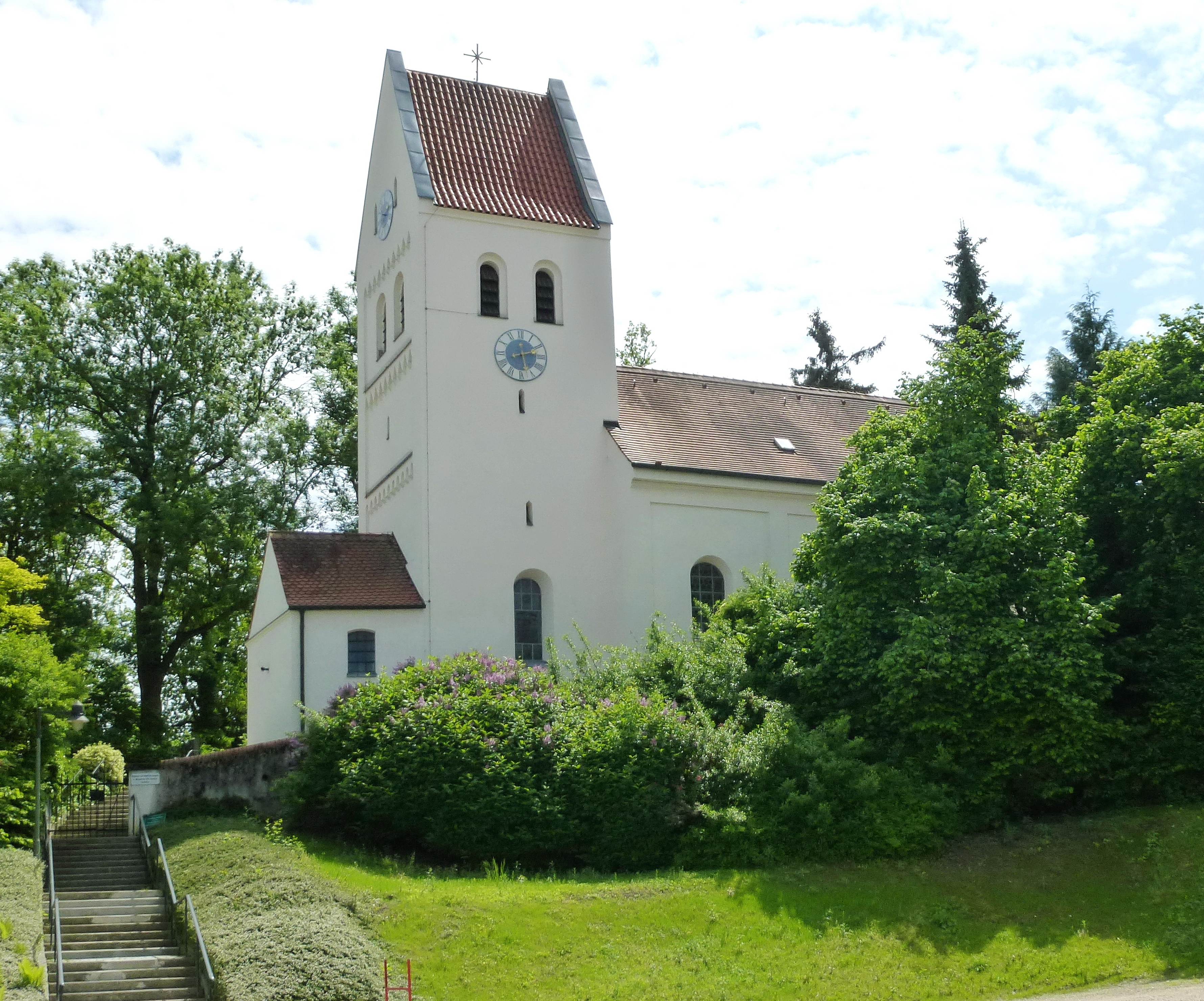 Günding, Sankt-Vitus-Straße 8, Katholische Filialkirche St. Vitus. Aufnahme aus N